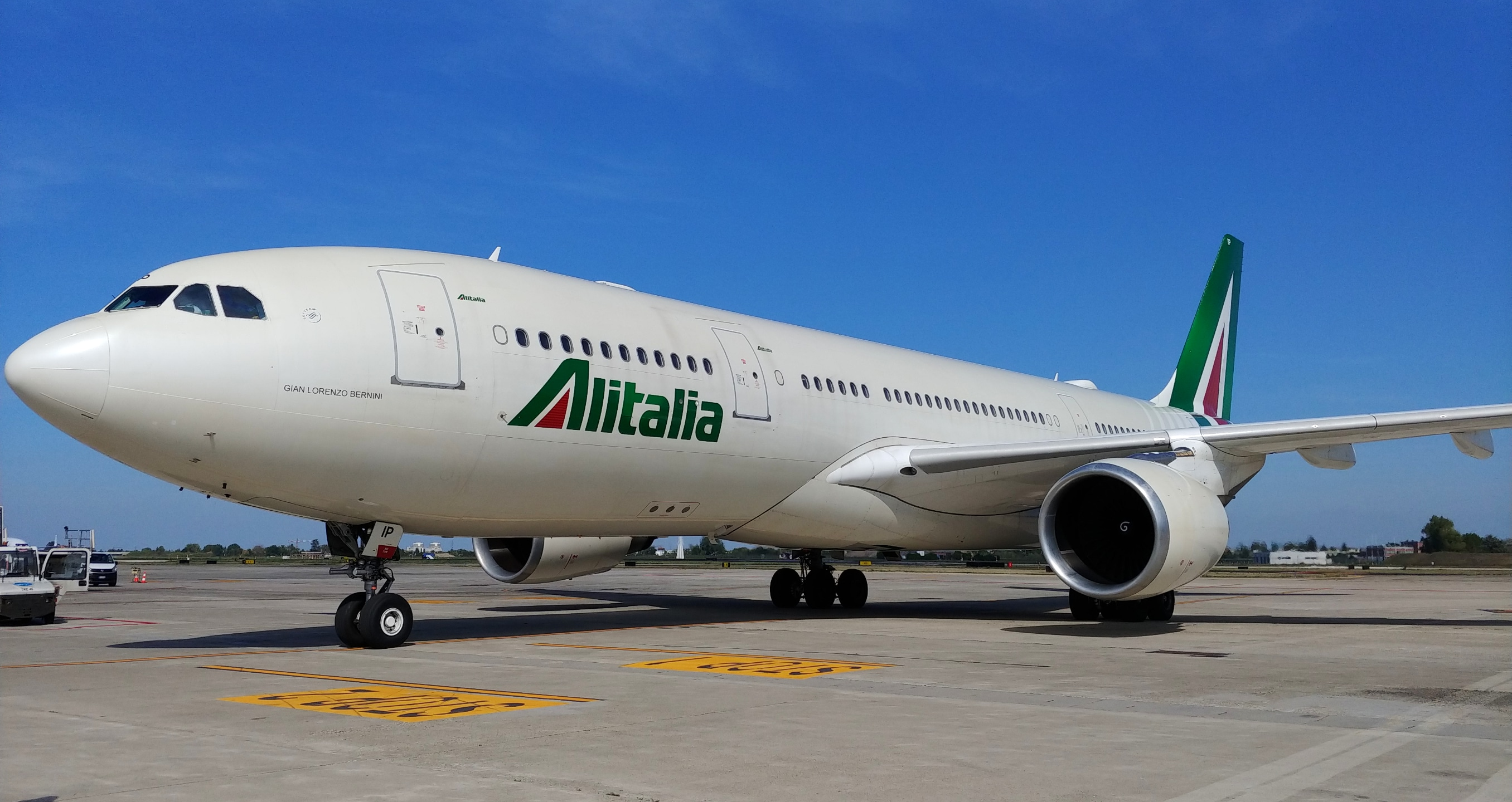 A330-200 Alitalia